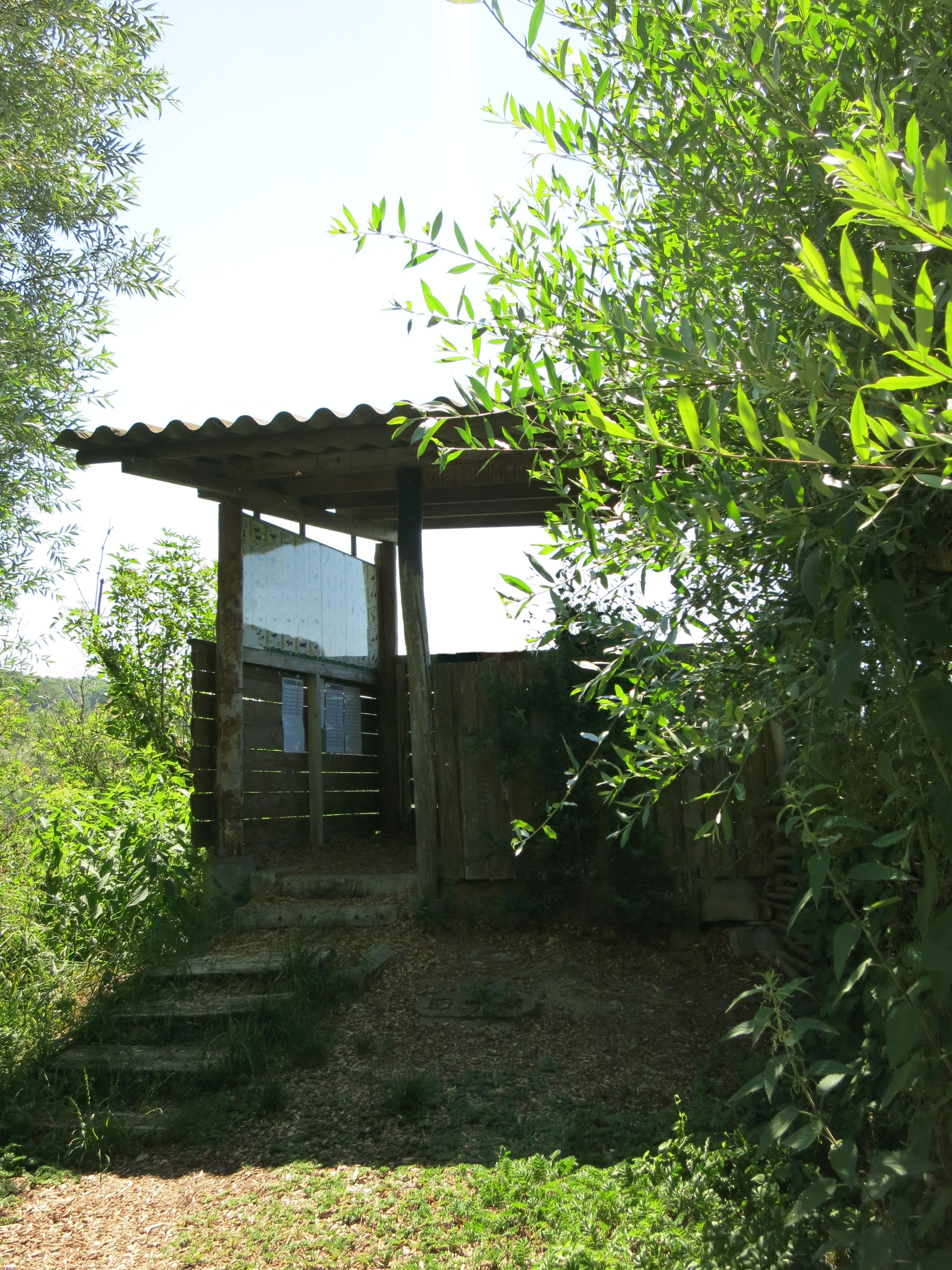 Auriedturm